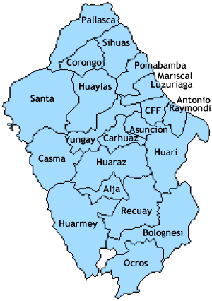 Provinzen der Region Ancash, selbst erstellt